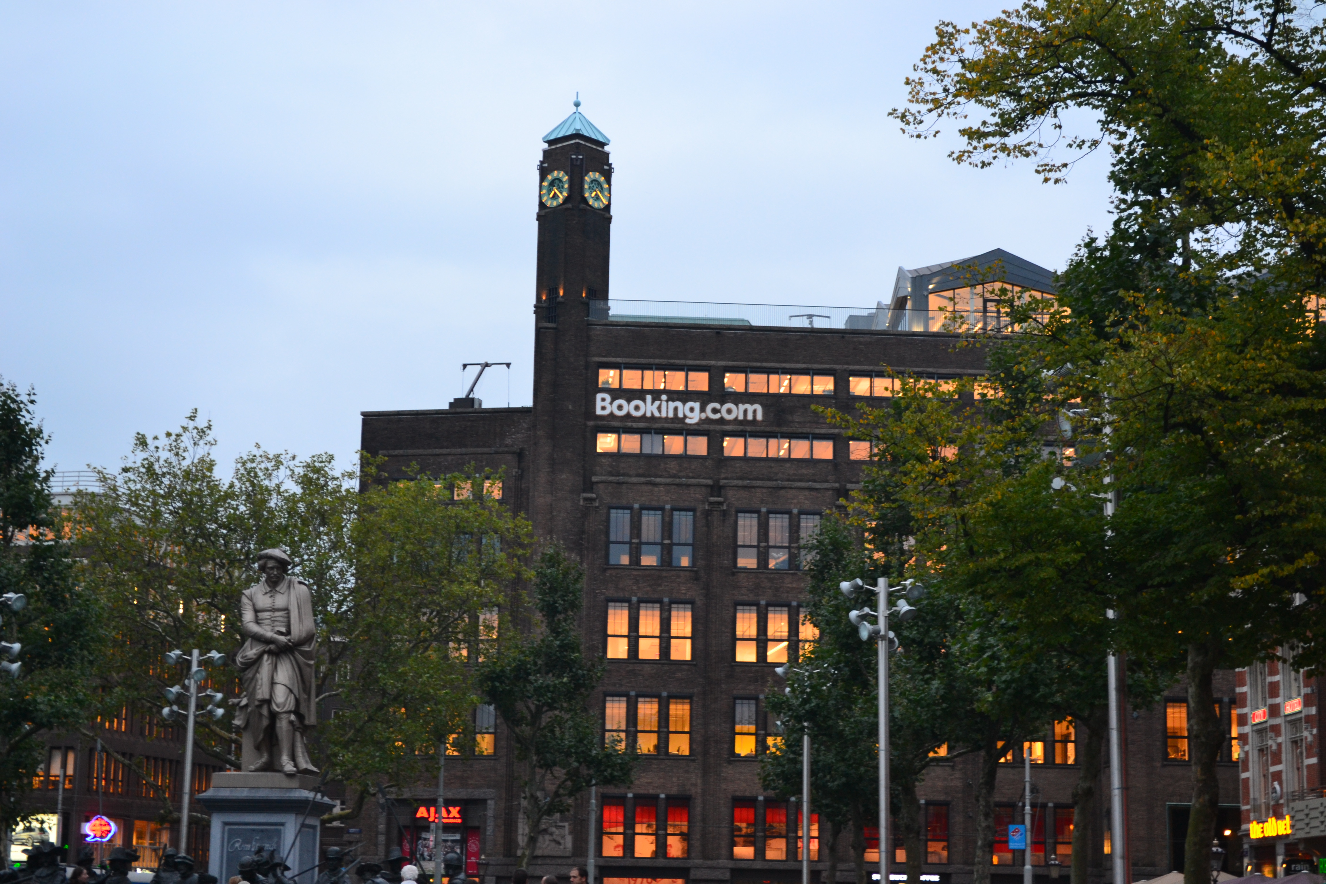 HQ in Amsterdam.